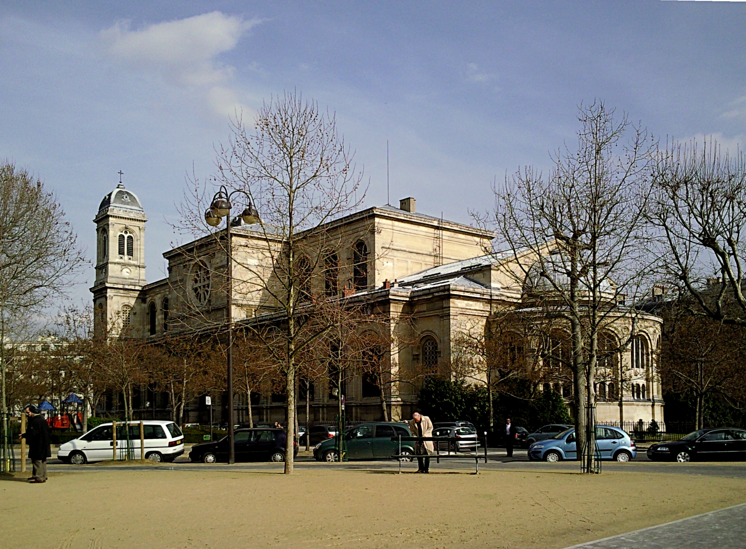 L'église Saint-François-Xavier-des-Missions-Étrangères dans le 7ème arrondissement de Paris (France).